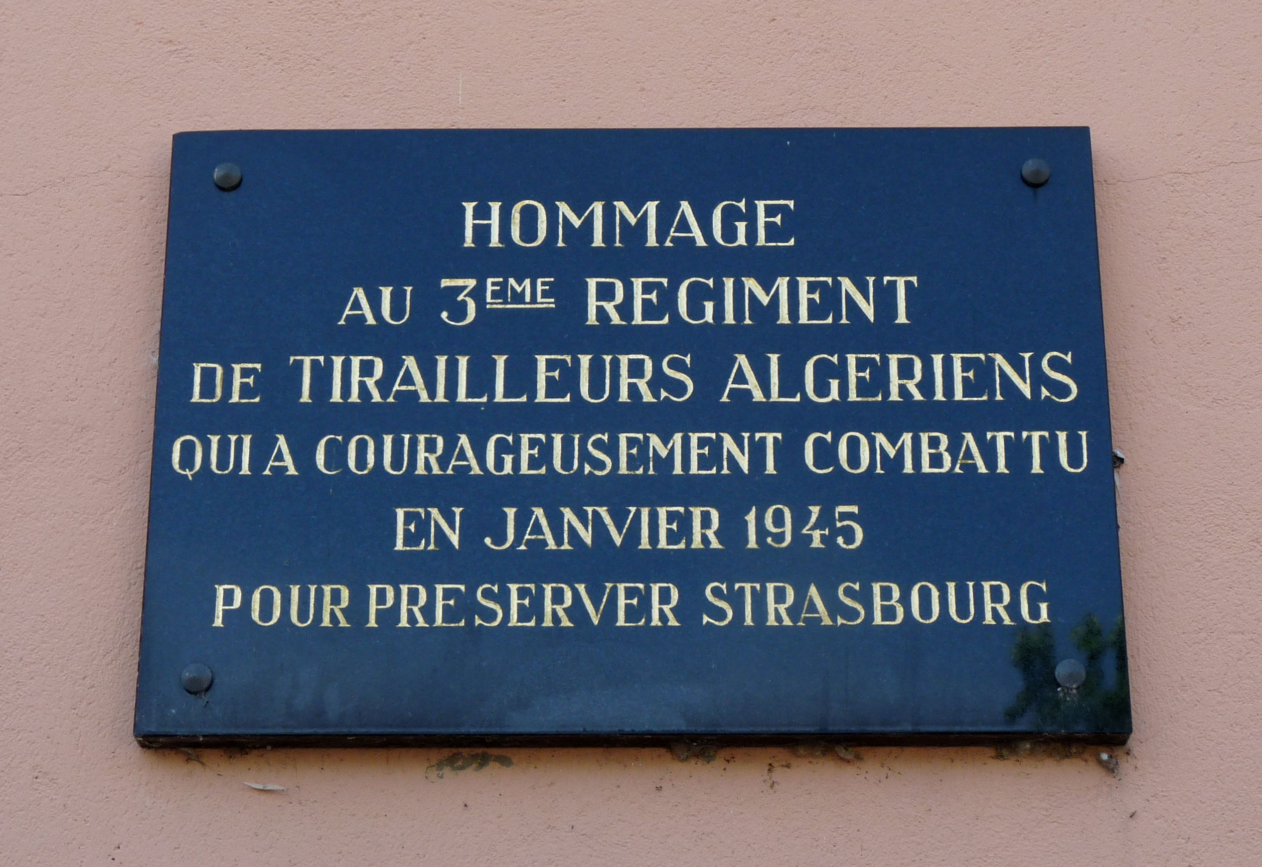 Plaque commémorative dédiée au 3e Régiment de Tirailleurs Algériens qui défendit Strasbourg en 1945 (Place du 3e Régiment de Tirailleurs Algériens, apposée à l'extérieur du mur de la fortification Vauban (Parc de la Citadelle à Strasbourg)